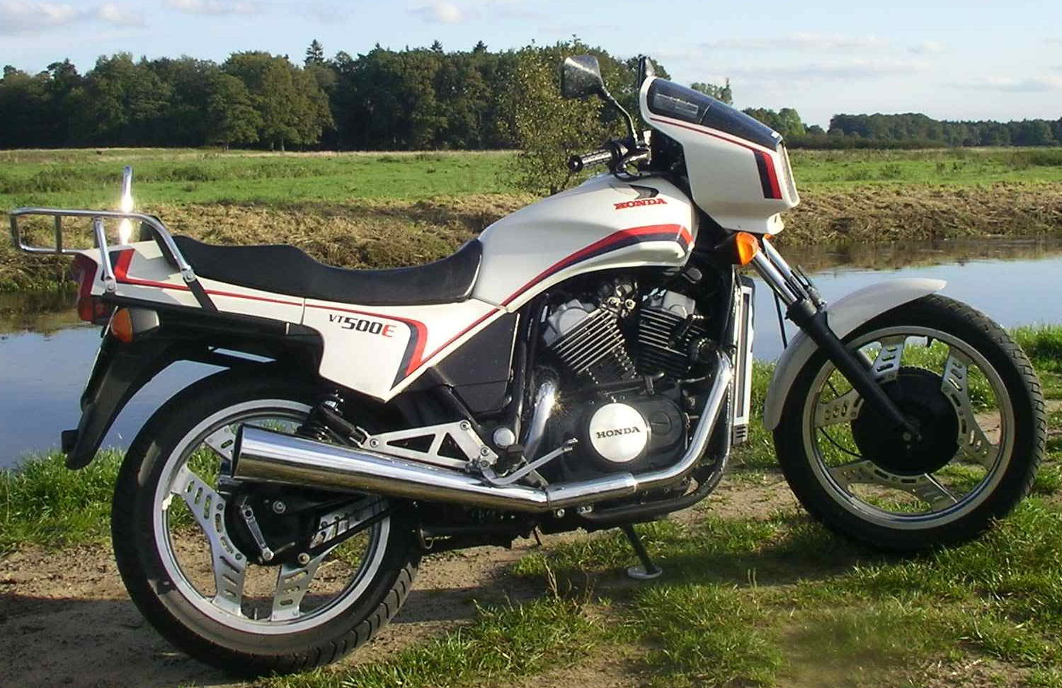 Motor Bike Honda VT 500 E PC 11 1984